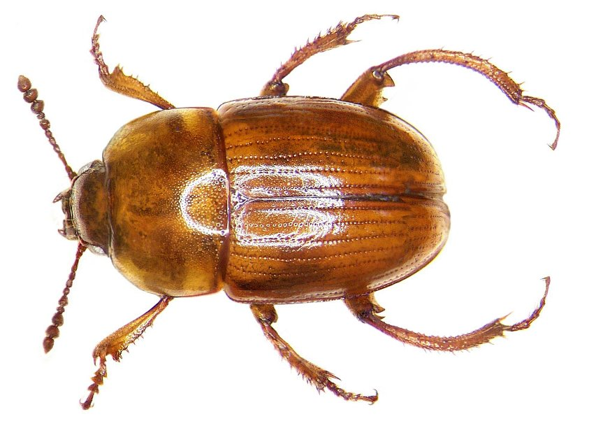 Familie: Leiodidae Grösse: 4-7 mm Verbreitung: Europa Ökologie: an unterirdischen Fruchtkörpern von Trüffeln und verwandten Bodenpilzen Fundort: Germania, Thüringen, Weimar leg. Gotha, 2002; det. A.Weigel Foto: U.Schmidt, 2007